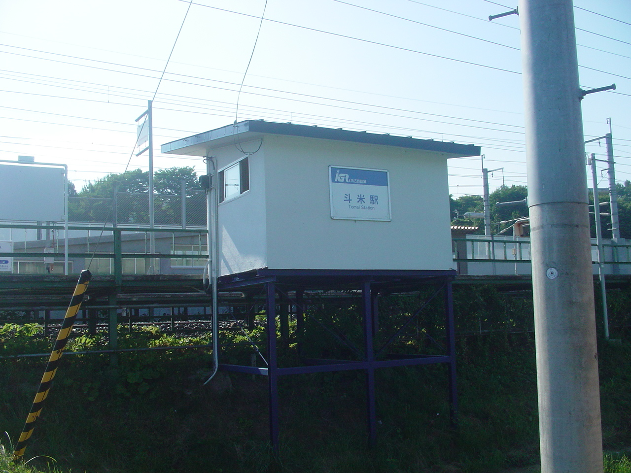 （斗米駅）